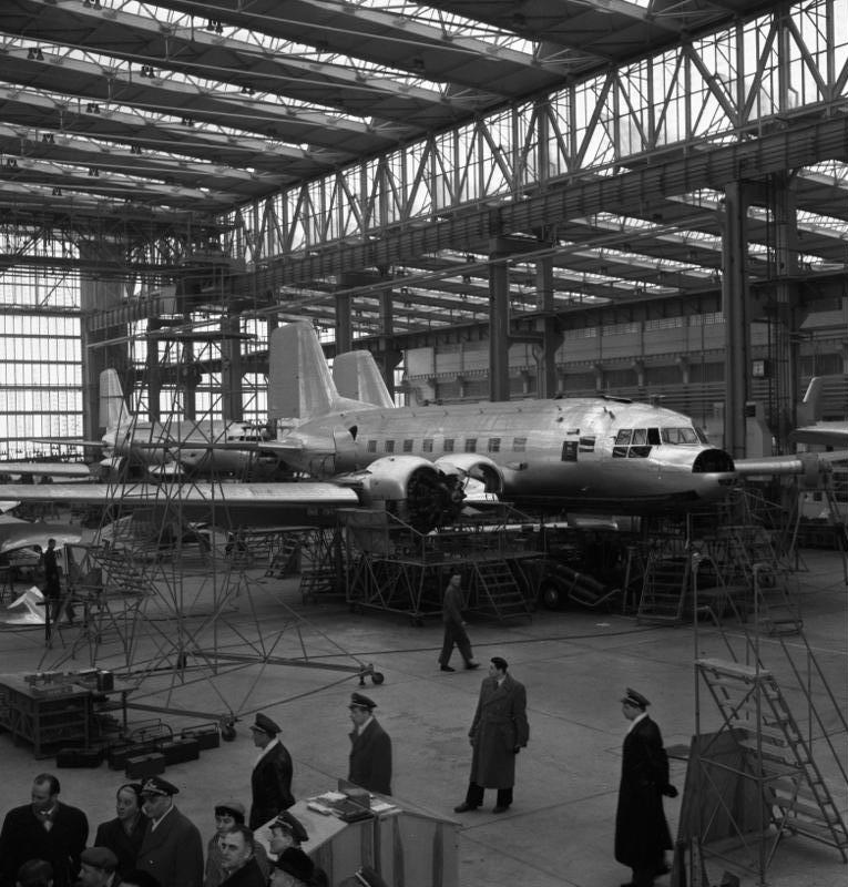 Flugzeugwerk Dresden, Montagehalle, IL-14 Zentralbild/Schlegel 10.3.58 Besuch der Generaldirektoren der Luftfahrtgesellschaften der sozialistischen Länder im VEB Flugzeugwerk Dresden am 10.3.58. U.B.z.: Eine Verkehrsmaschine IL-14 in der Montagehalle.